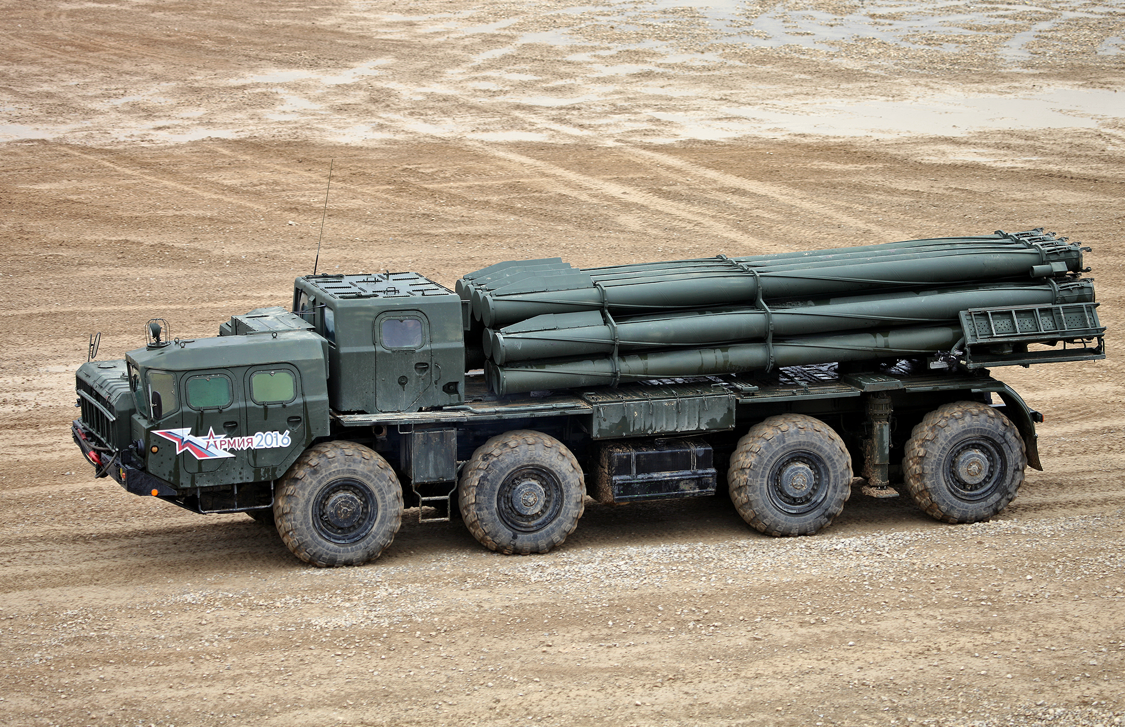 Боевая машина 9А52-2 РСЗО 9К58 Смерч (9A52-2 launch vehicle of 9K58 / BM-30 Smerch MLRS)